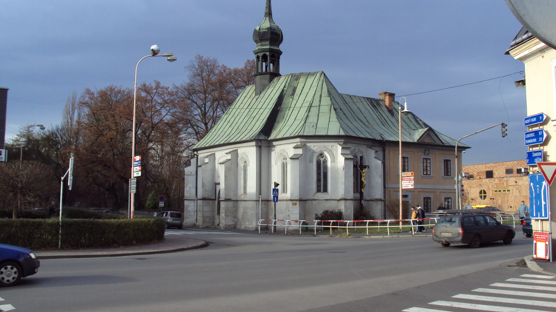 Kostel sv.Maří Magdaleny ve středu České Lípy u Ploučnice